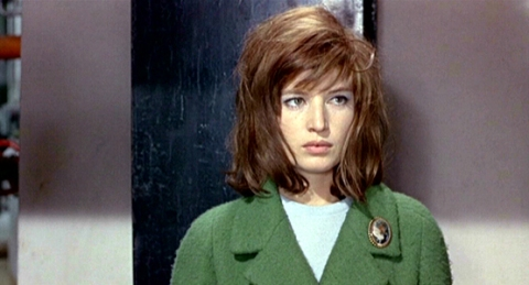 Képkocka a „Vörös sivatag” című filmből, Monica Vitti